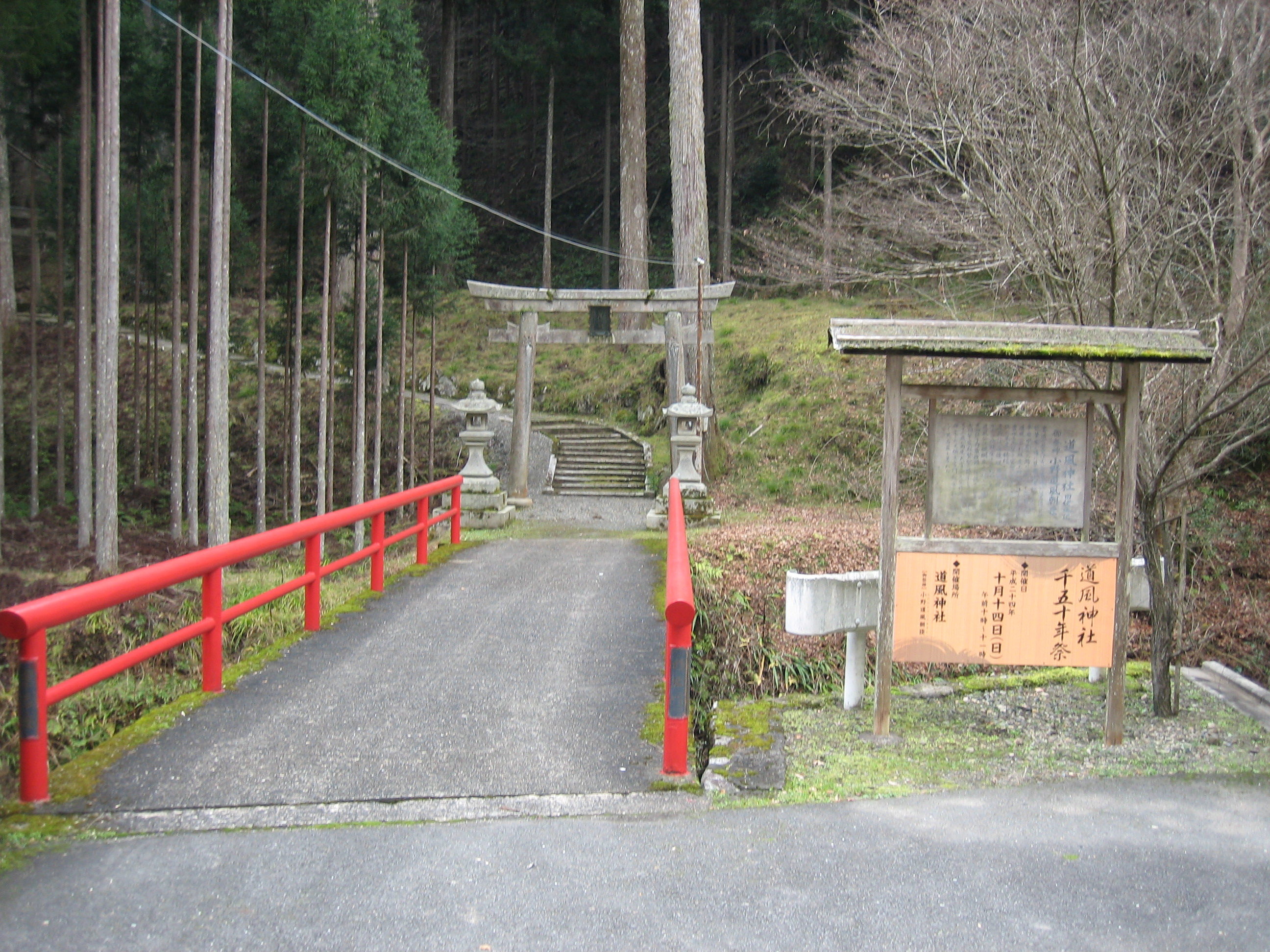 道風神社を京都市北区杉坂道風町から撮影